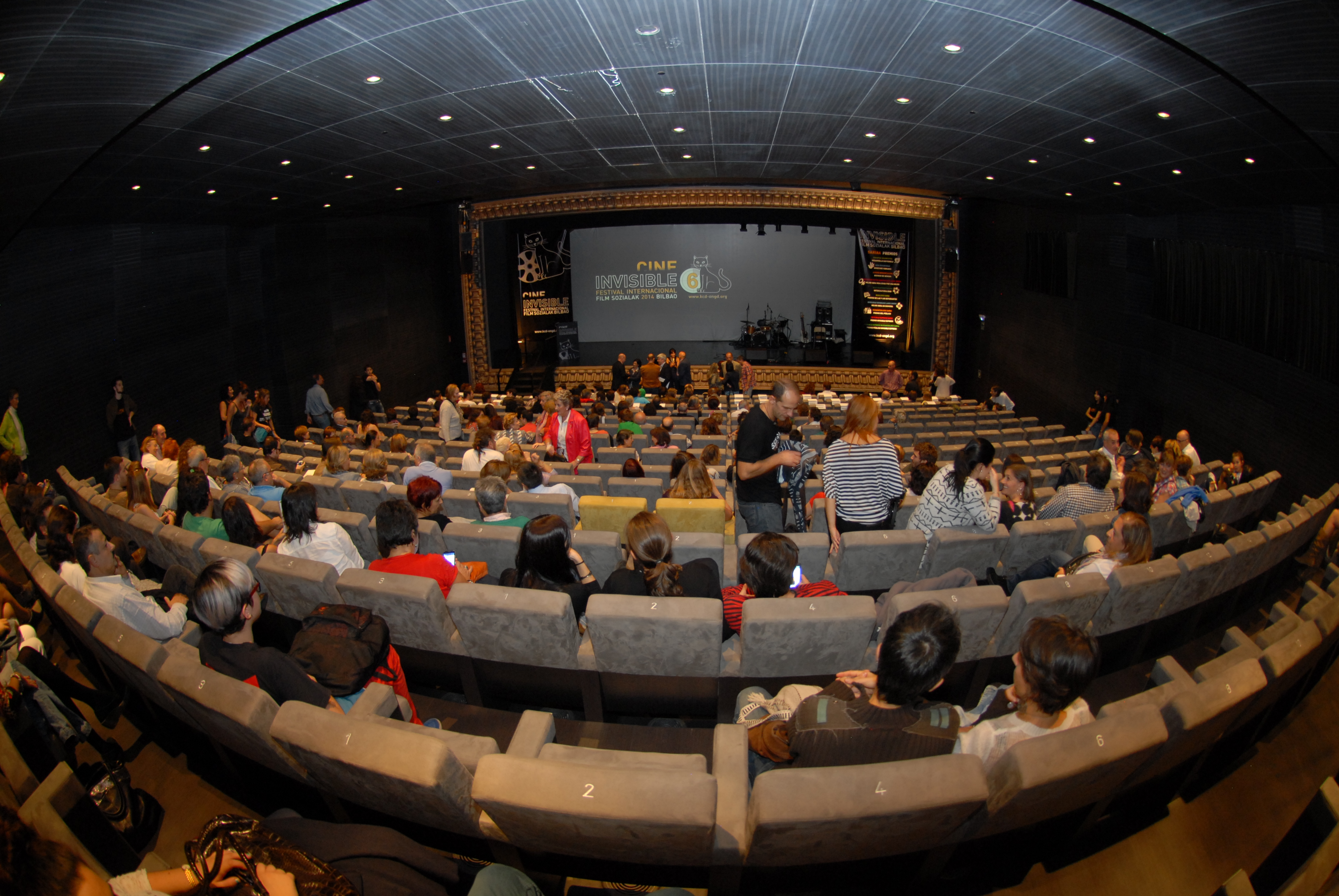 Gala de clausura del 6º Festival Internacional de Cine Invisible "Filme Sozialak" 2014